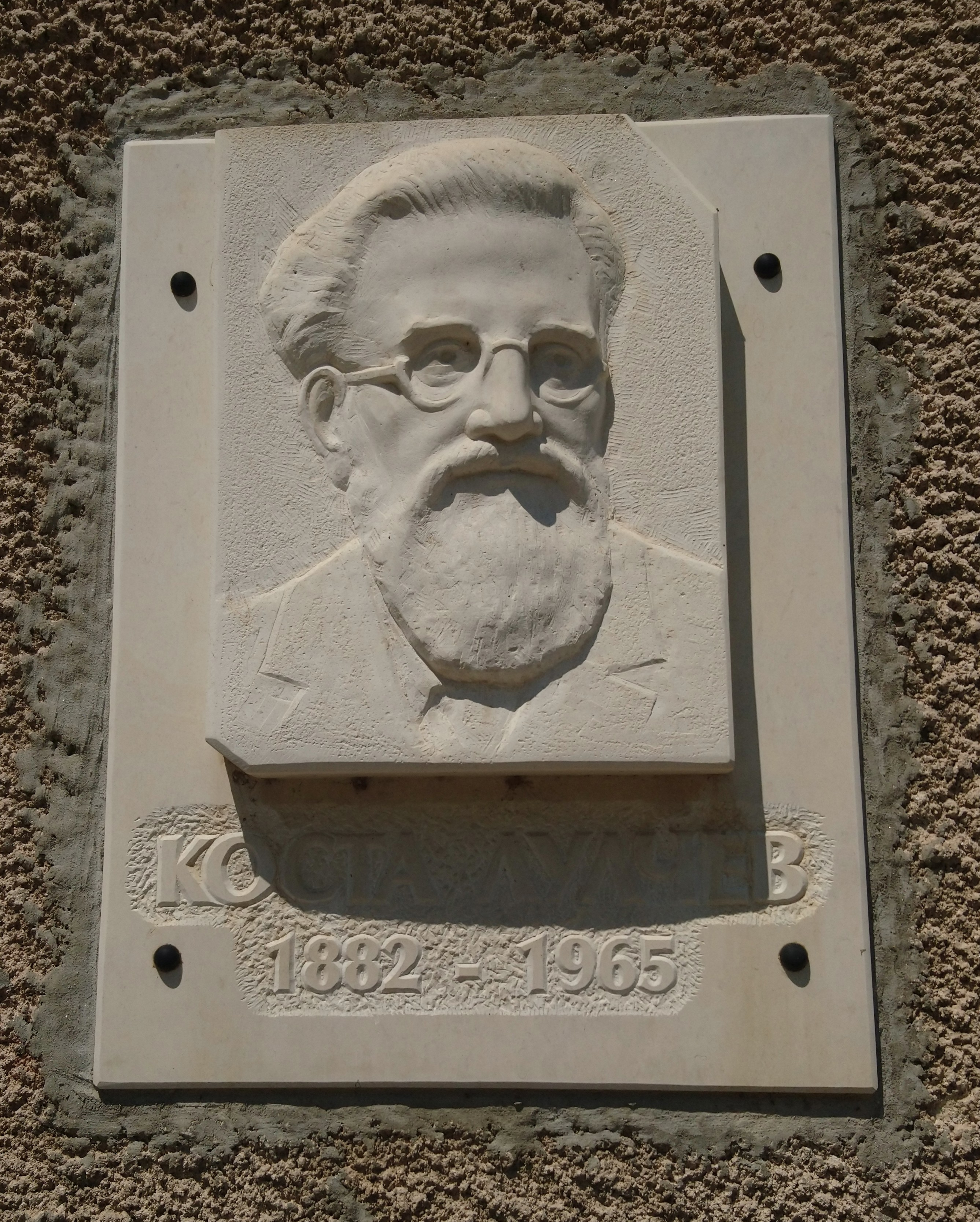 Паметна плоча на Коста Лулчев в центъра на Оряхово